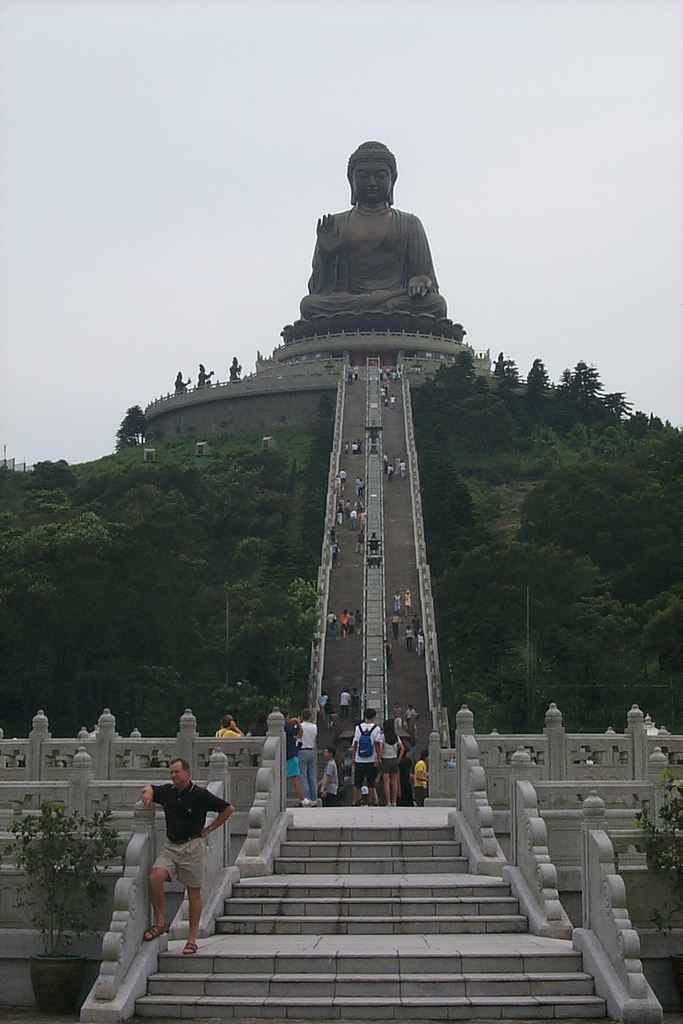 Tian Tan Buddha in Lantau